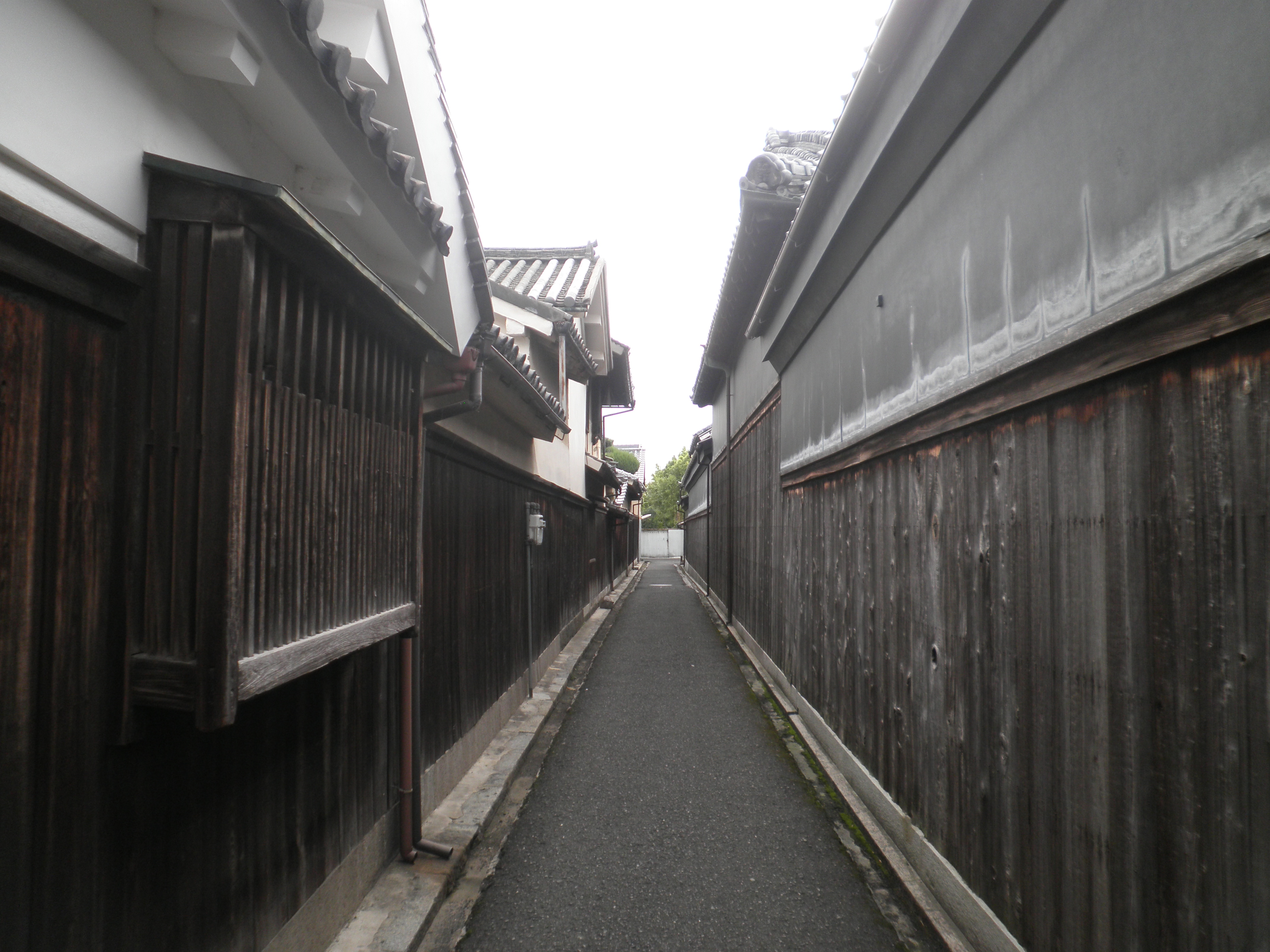 奈良県ja:橿原市八木町の街並み